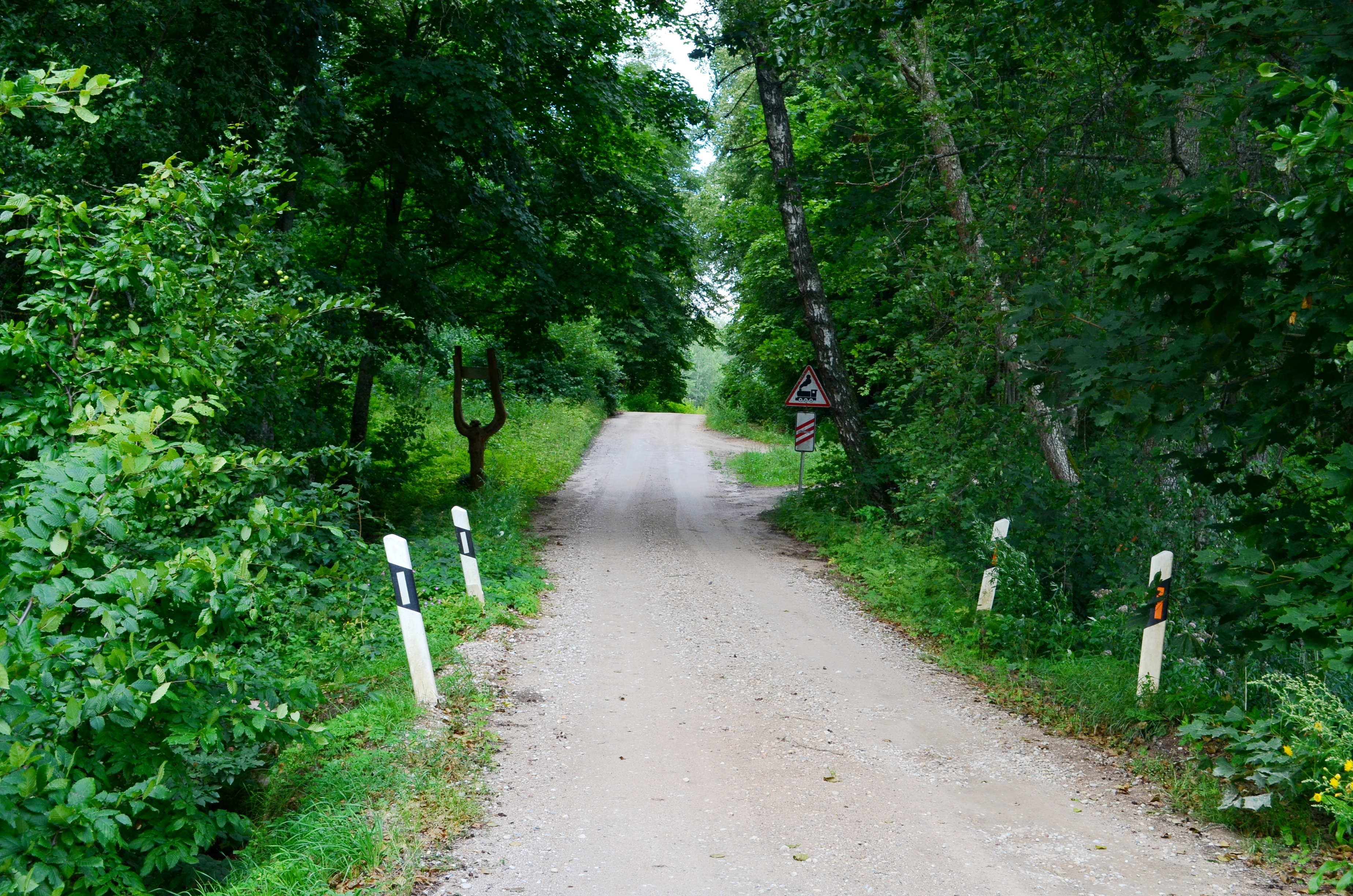 Žiezdrelės k., Utenos raj.